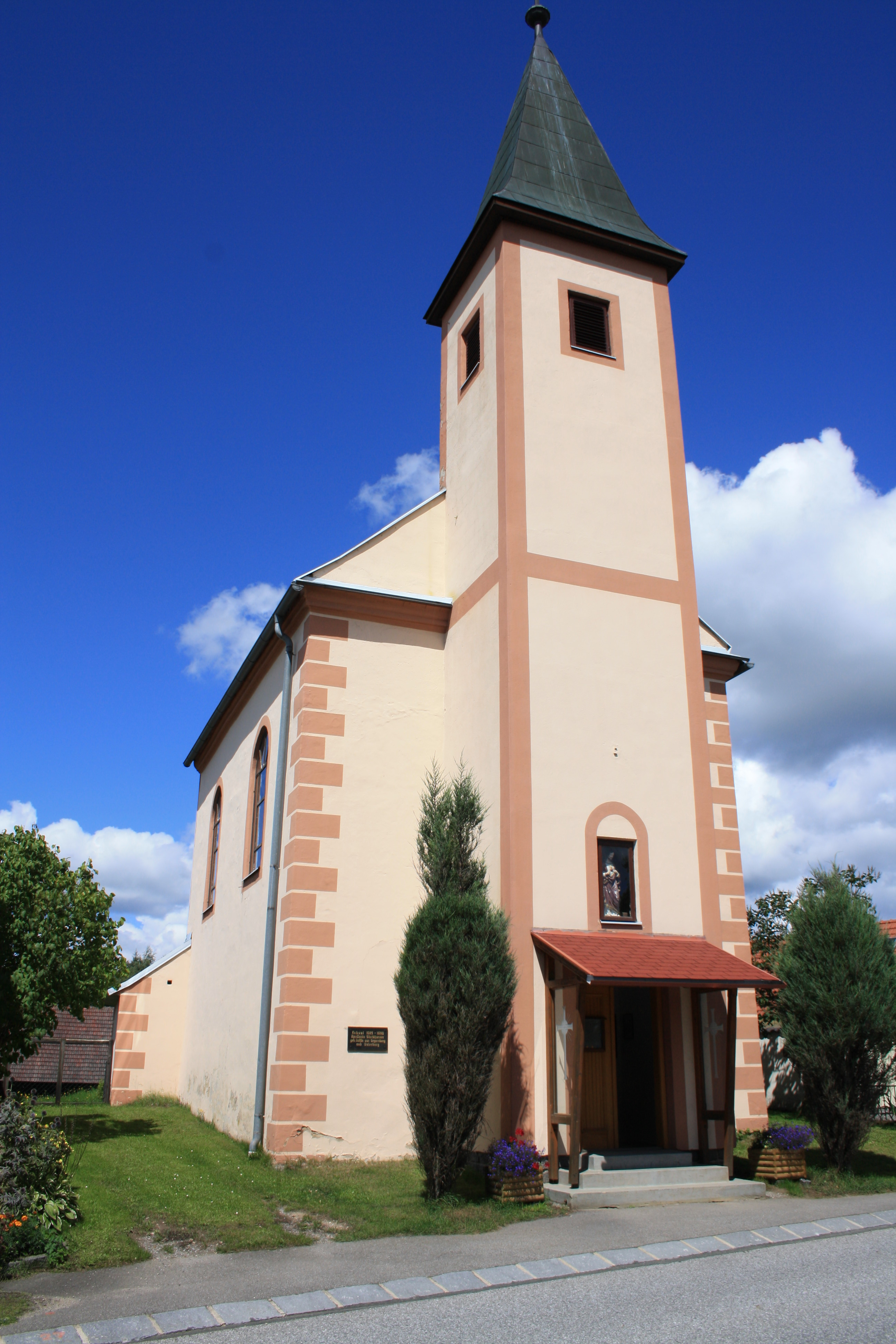 Ortskapelle in Heinreichs, Gemeinde Vitis, Lower Austria